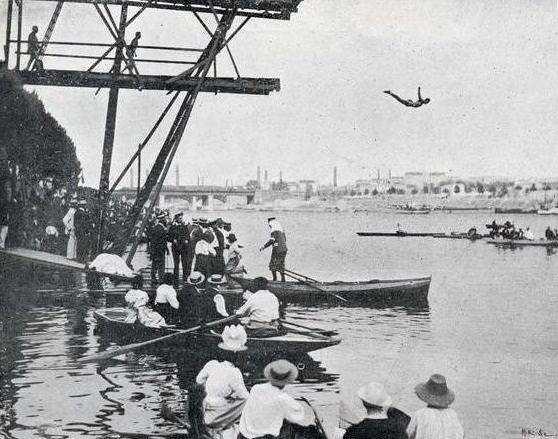 Le plongeoir du bassin d'Asnières, lors des compétitions de natation des Jeux Olympiques de 1900 (épreuve non reconnue).